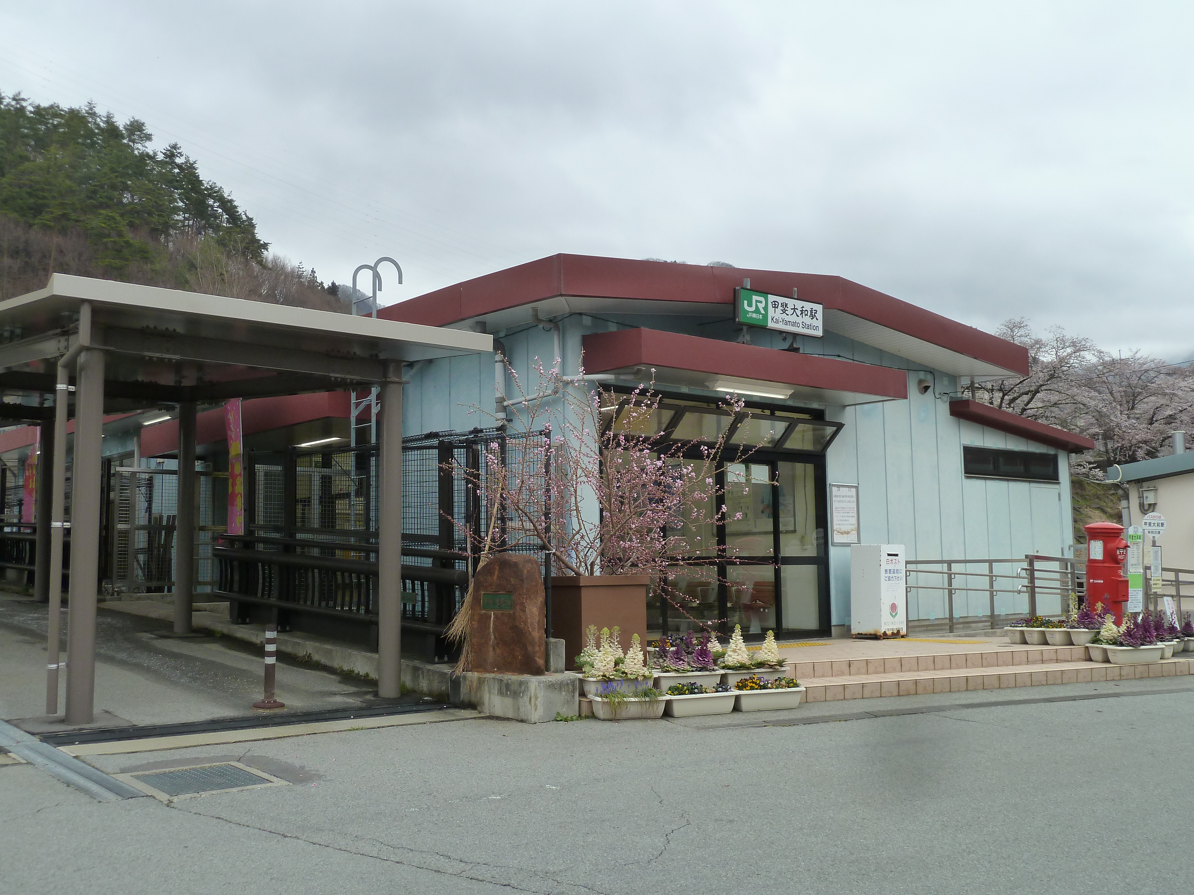 リニューアル後の甲斐大和駅